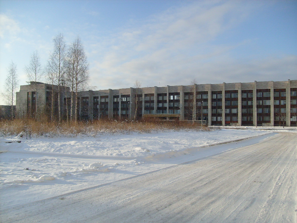 НИИ Физики СПбГУ